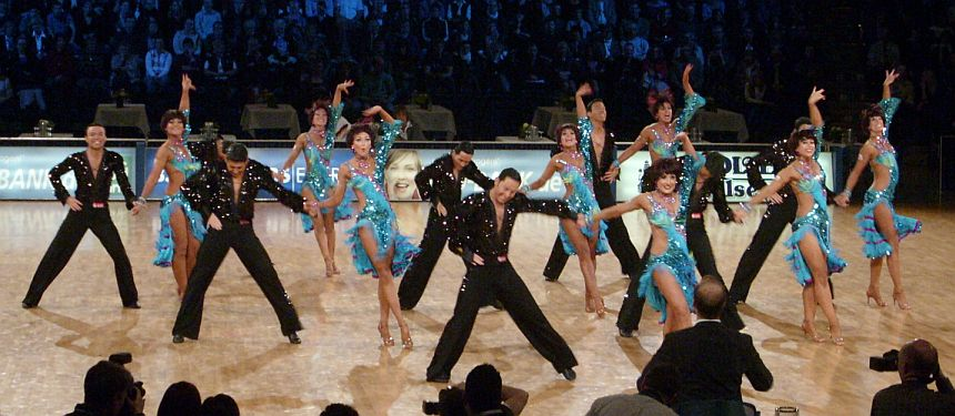 Lateinformation der TSG Bremerhaven bei der Deutschen Meisterschaft der Formationen 2009